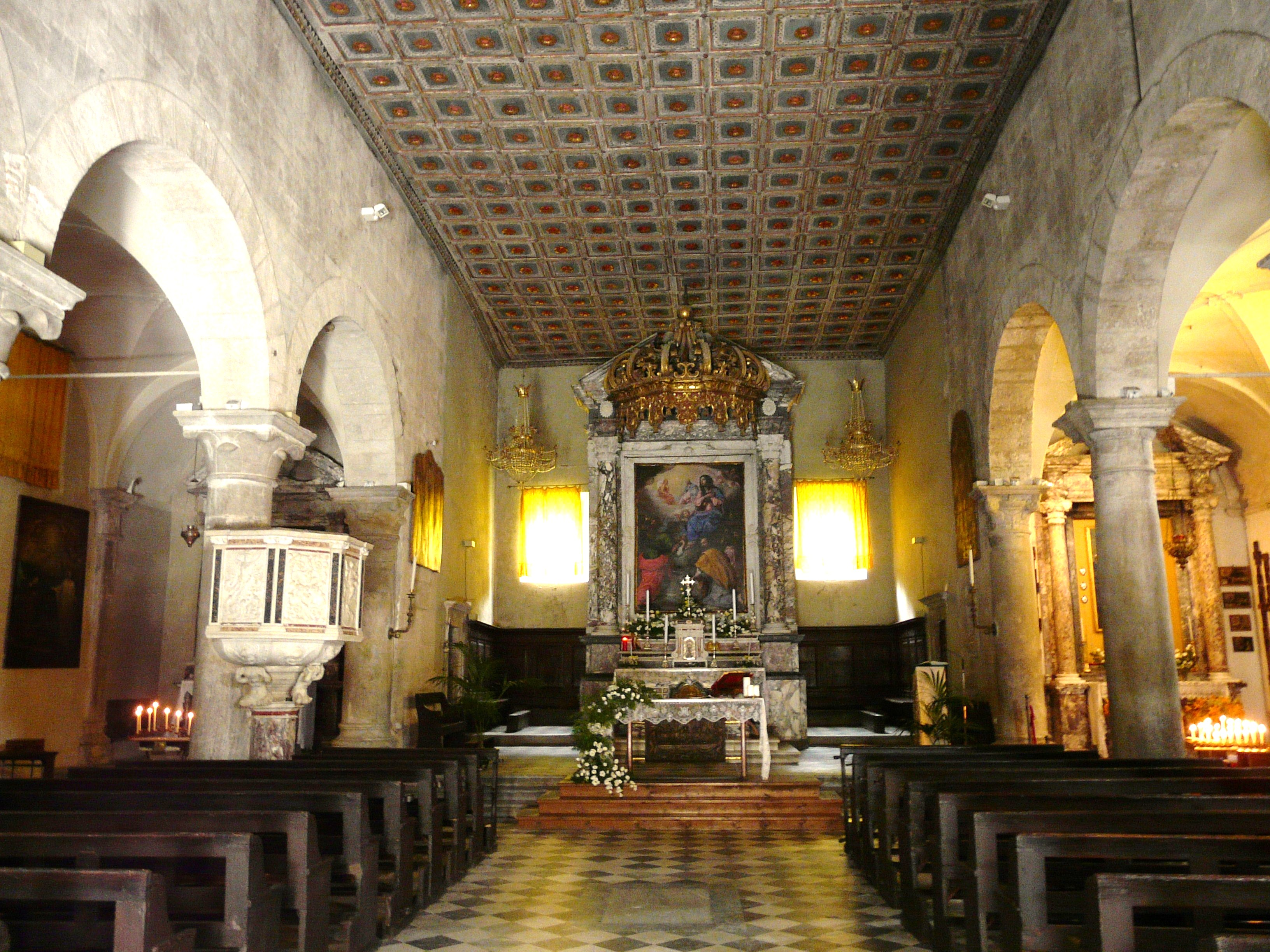 Navata centrale della Chiesa di Santa Maria Assunta, Stazzema, Toscana, Italia